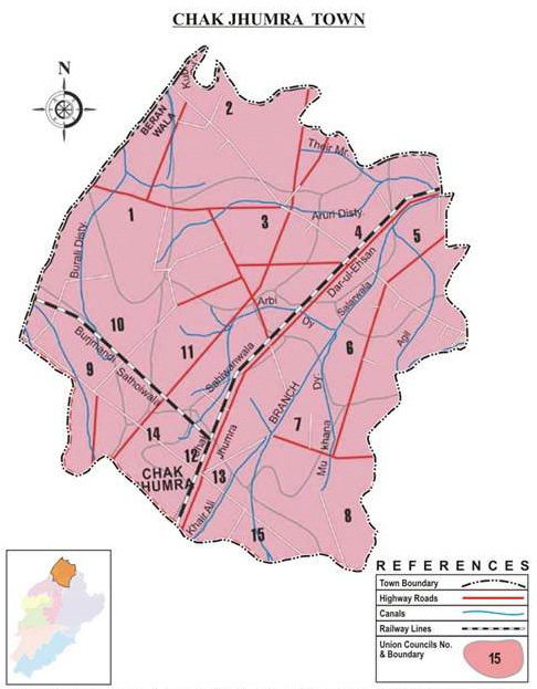 پنجابی: چک جھمرہ تصیل دیاں یونین کوسلاں